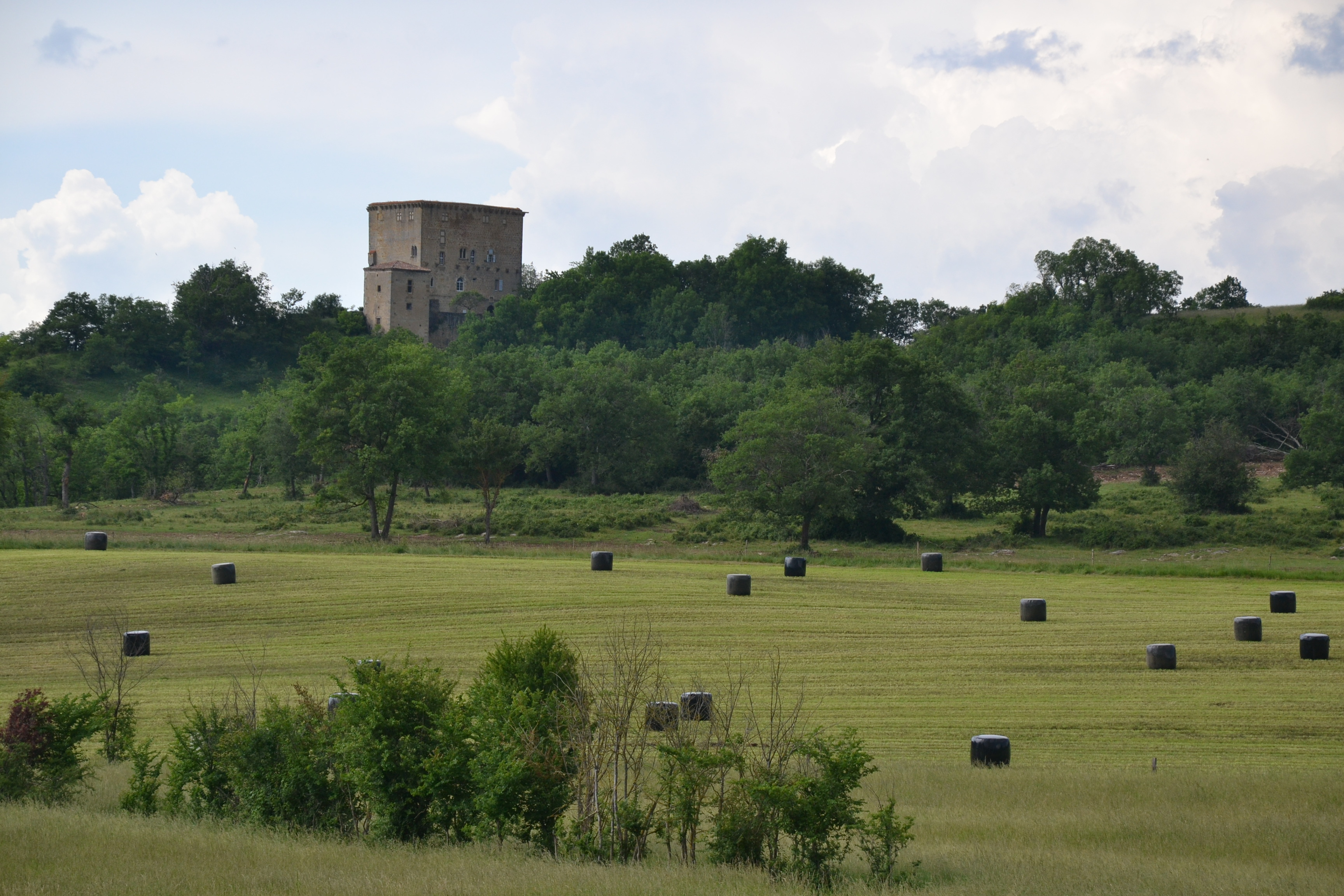 La tour de Saint-Quentin-la-Tour (Ariège, France).